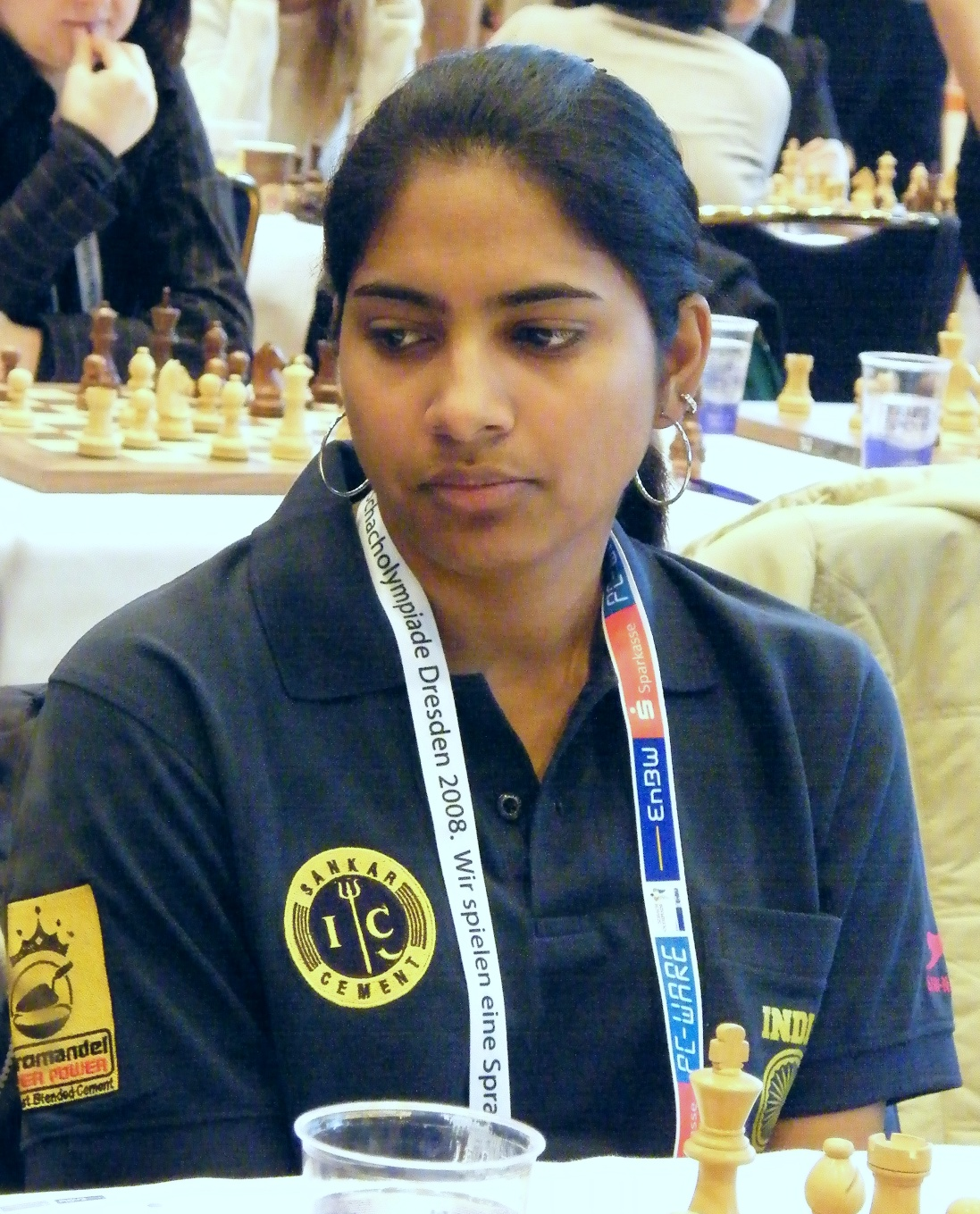 Mary Ann Gomes bei der 38. Schacholympiade in Dresden 2008